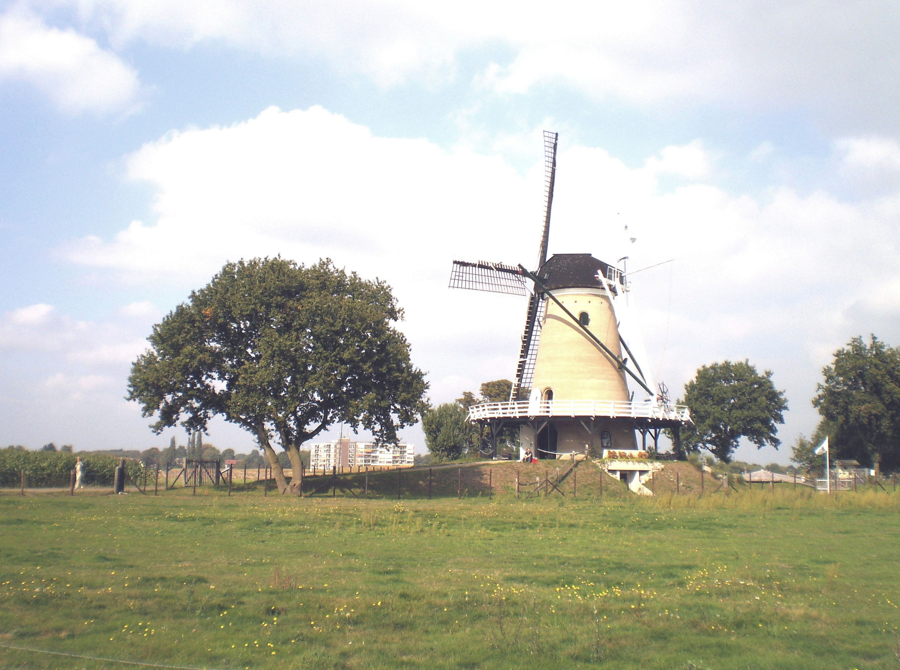 Soest mûne De Wynhûn